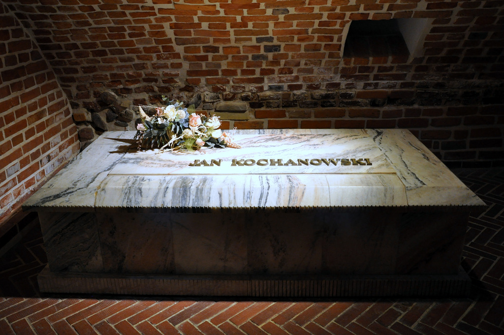 Zwoleń, kościół p.w. Podwyższenia Krzyża Świętego z XVI w. Krypta rodziny Kochanowskich pod kaplicą św. Franciszka